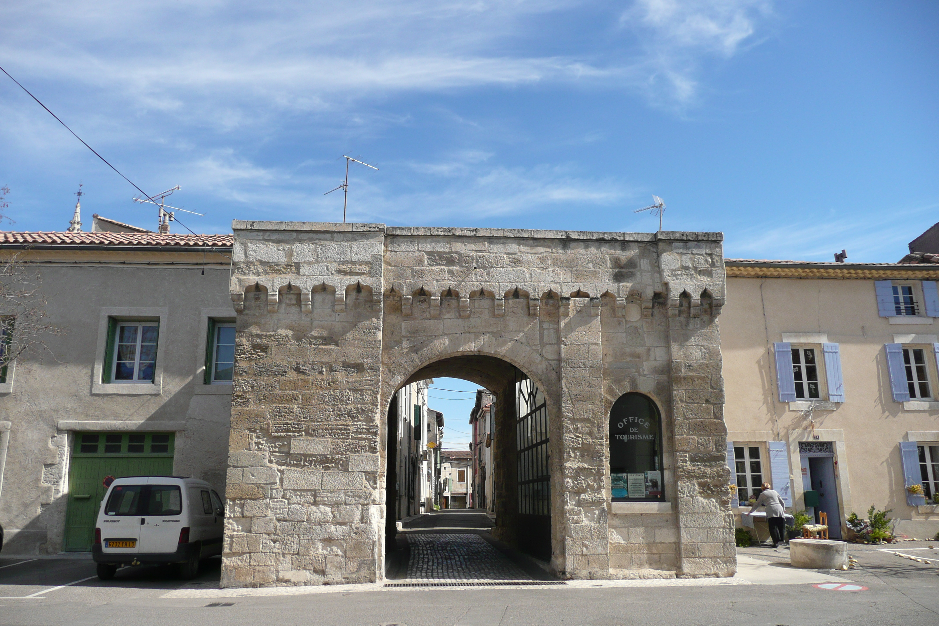 Porte à Graveson (Bouches-du-Rhône).